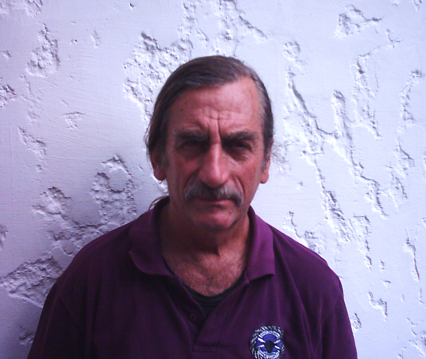 Fotografía del político uruguayo Jorge Zabalza